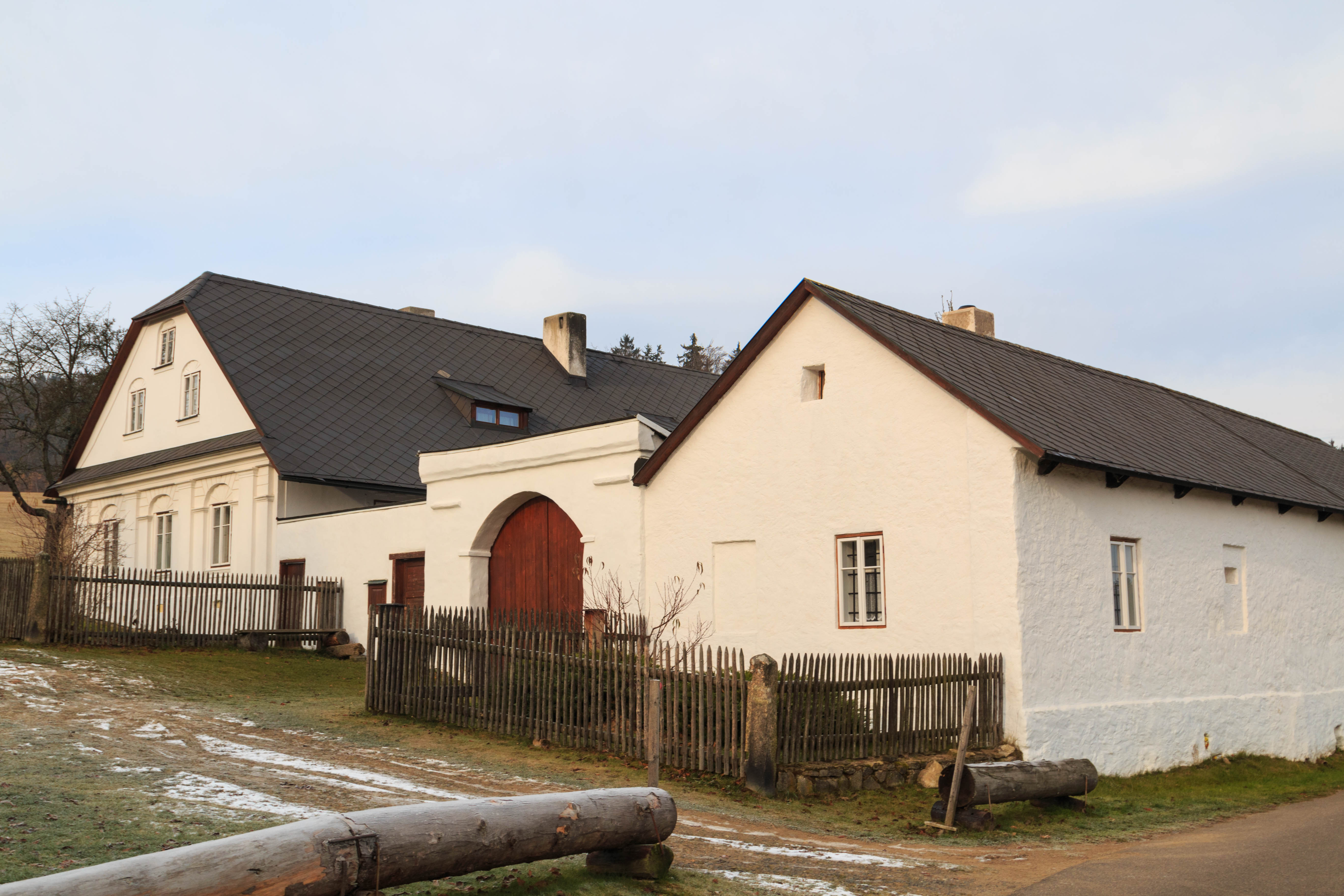 Blatiny - č. 26